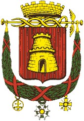 Armoiries de la commune de Caen.